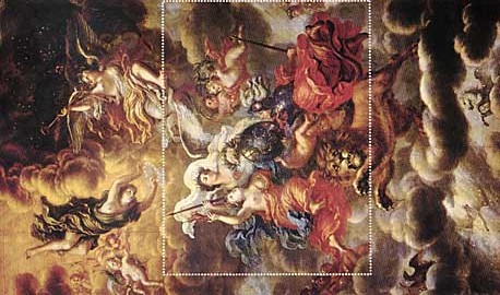 Ehrenstrahlsalongens plafondmålning, markering blev motiv för Czeslaw Slanias 1000:e frimärke